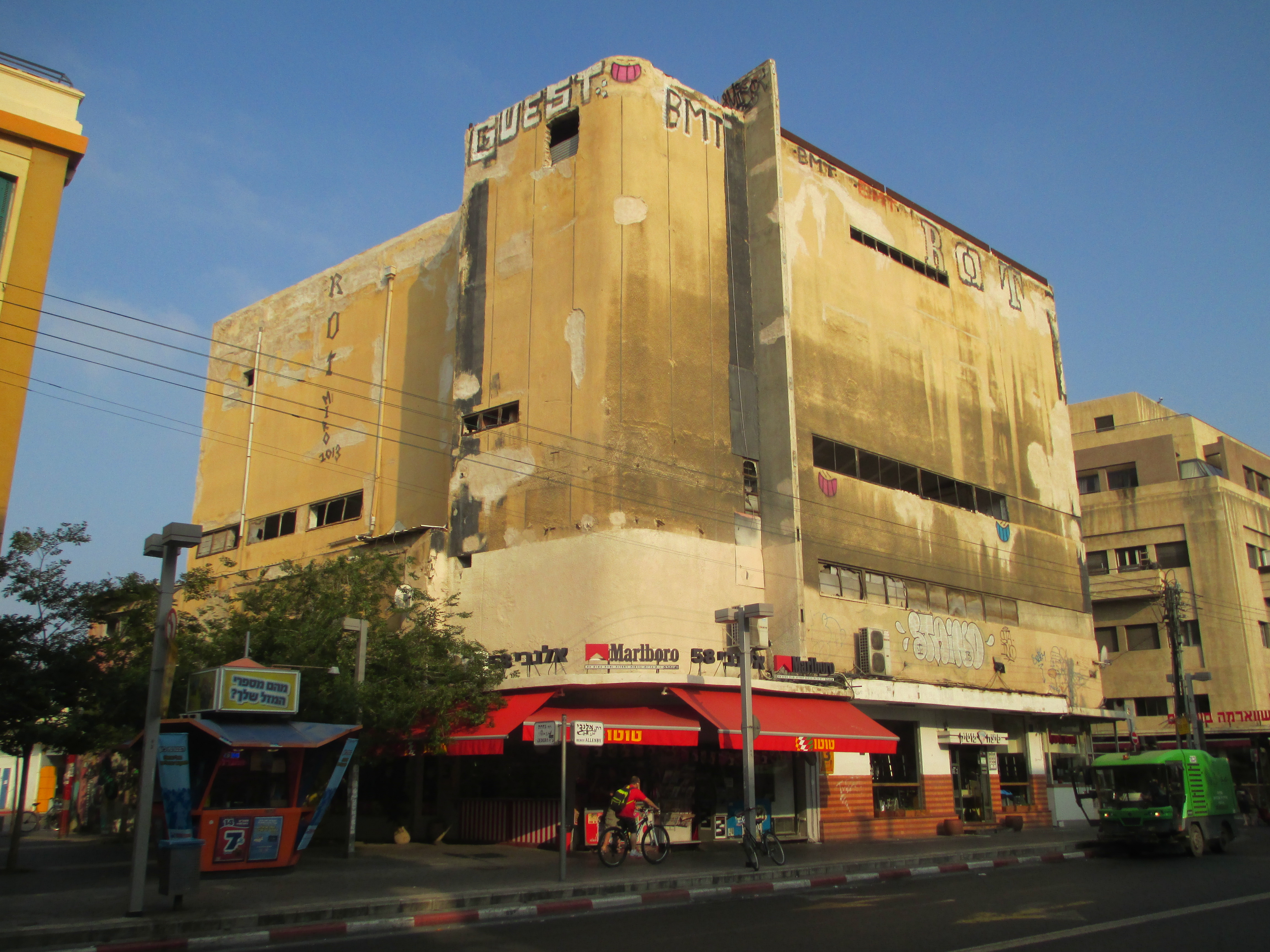 בנין בית הקולנוע אלנבי לשעבר